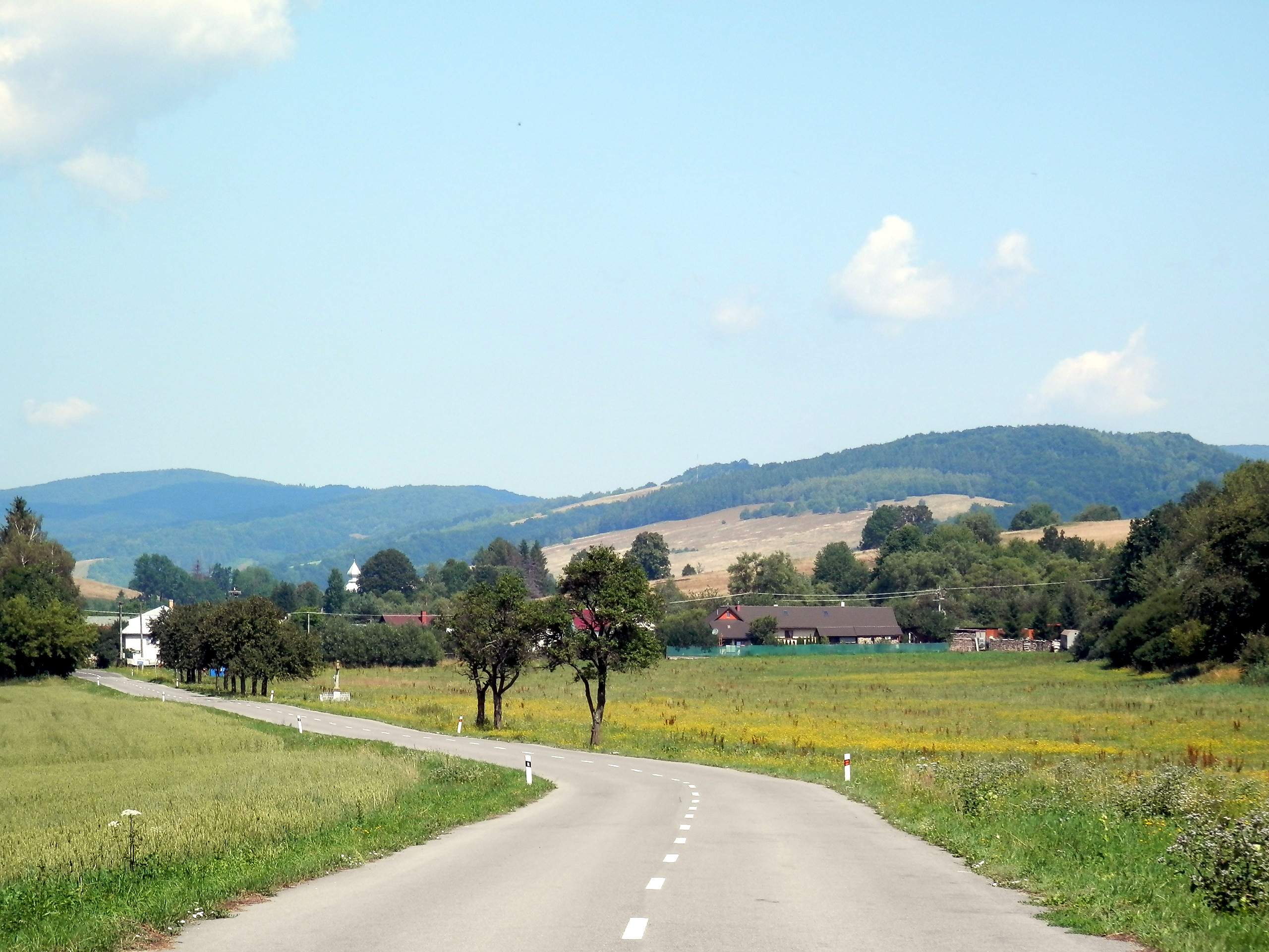 Najstaršia písomná správa o Habure je z roku 1543. Pohraničná obec leží v Nízkych Beskydách, územno-správne patrí do okresu Medzilaborce, kraj Prešovský. Historicky ju začleňujeme do regiónu Horný Zemplín. V obci žije asi 500 obyvateľov.